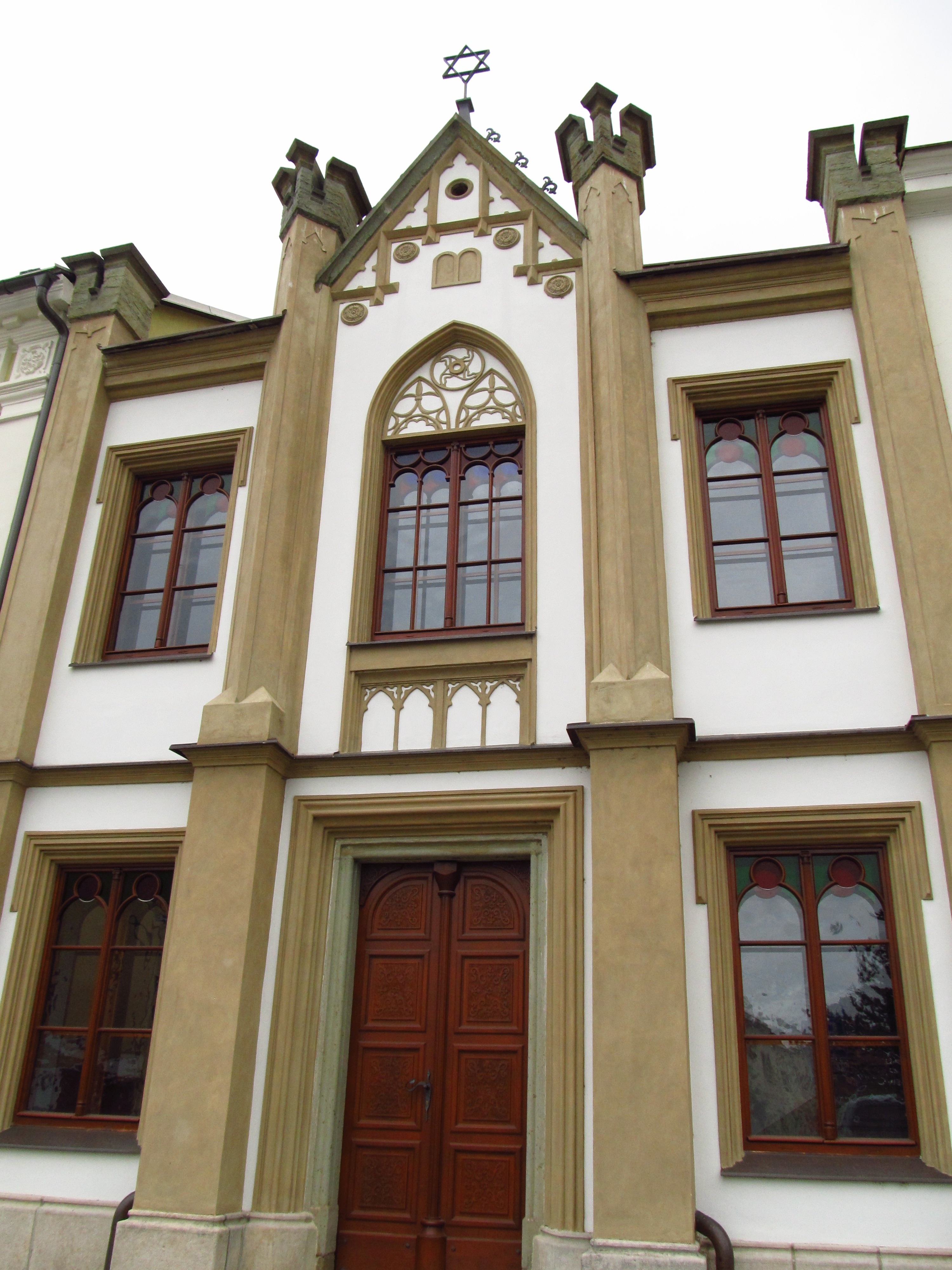 Synagoga (Dobruška), Šubrtovo nám. 646, Dobruška, Dobruška.